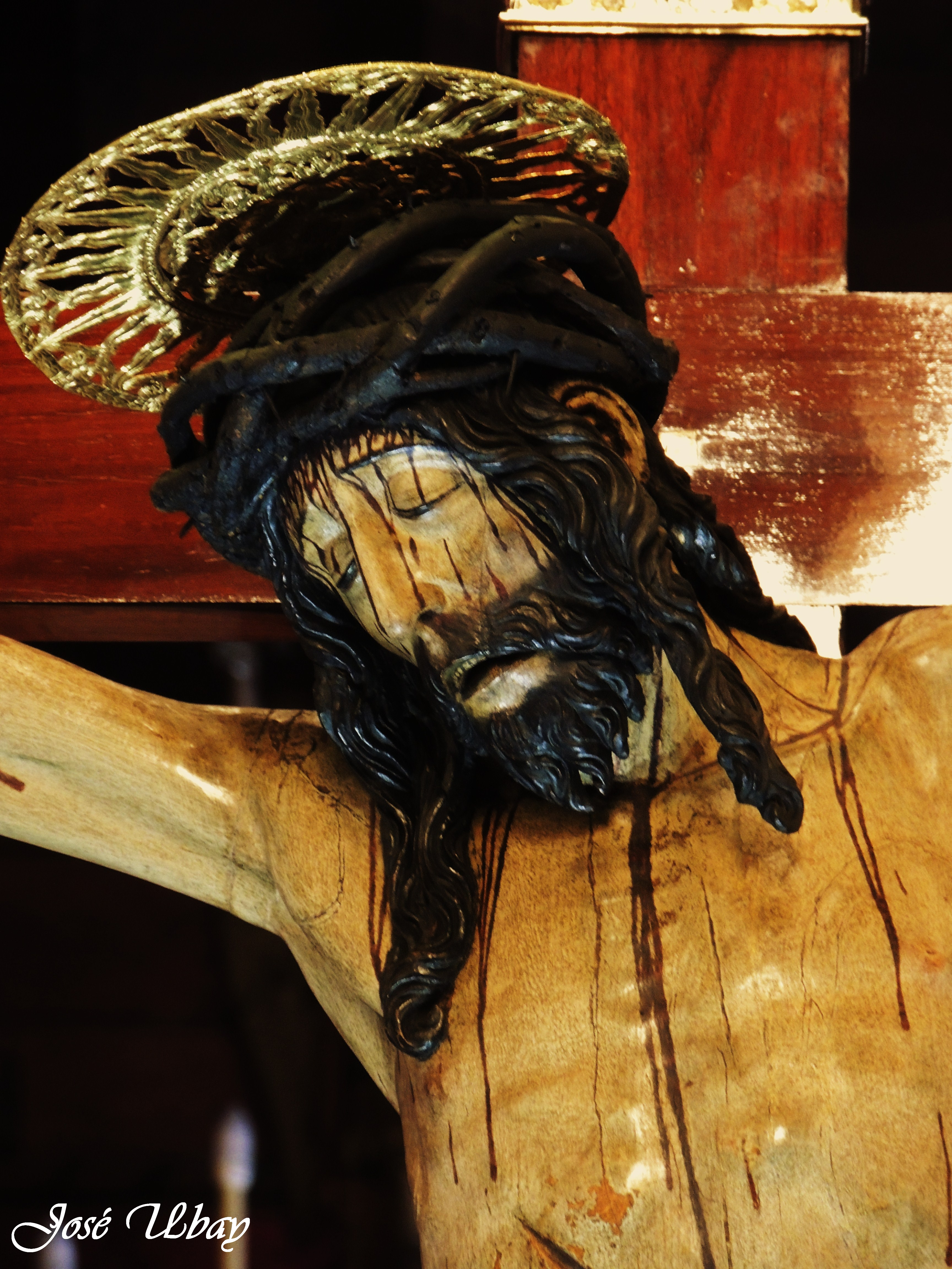 Santísimo Cristo de La Laguna. Siglo XVI. Real Santuario del Santísimo Cristo de La Laguna (Tenerife).